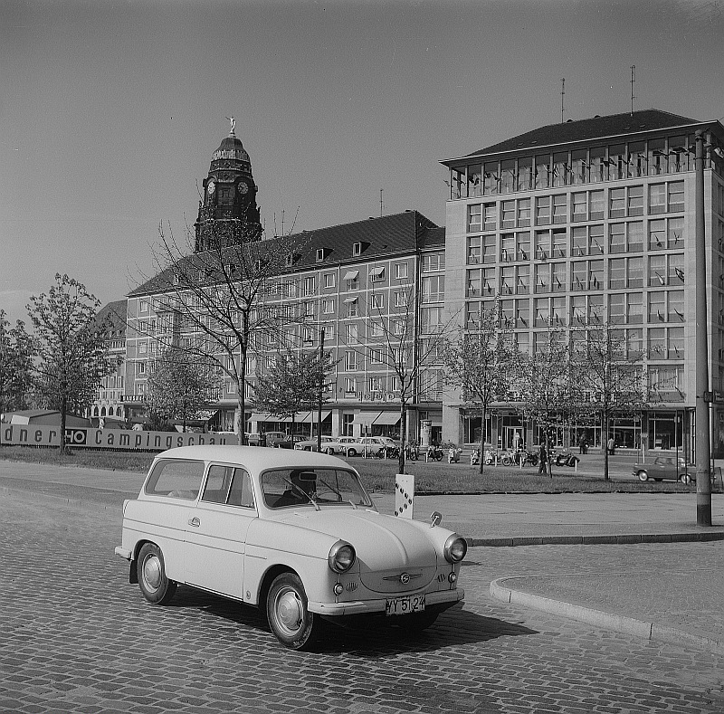 Original image description from the Deutsche FotothekDresden. Blick zur 5. Campingschau auf dem Grünstreifen der Leningrader Straße am Pirnaischen Platz